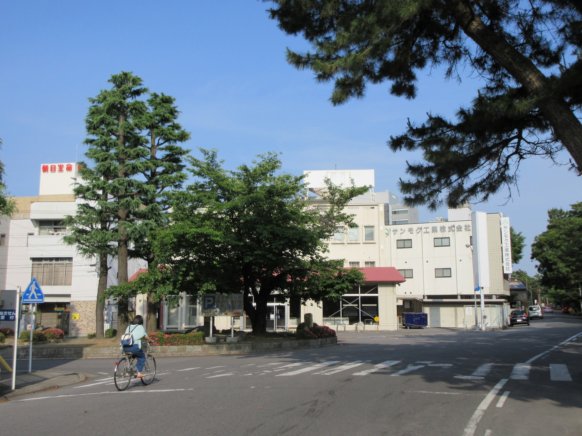 中央緑道南端（岡崎市唐沢町）